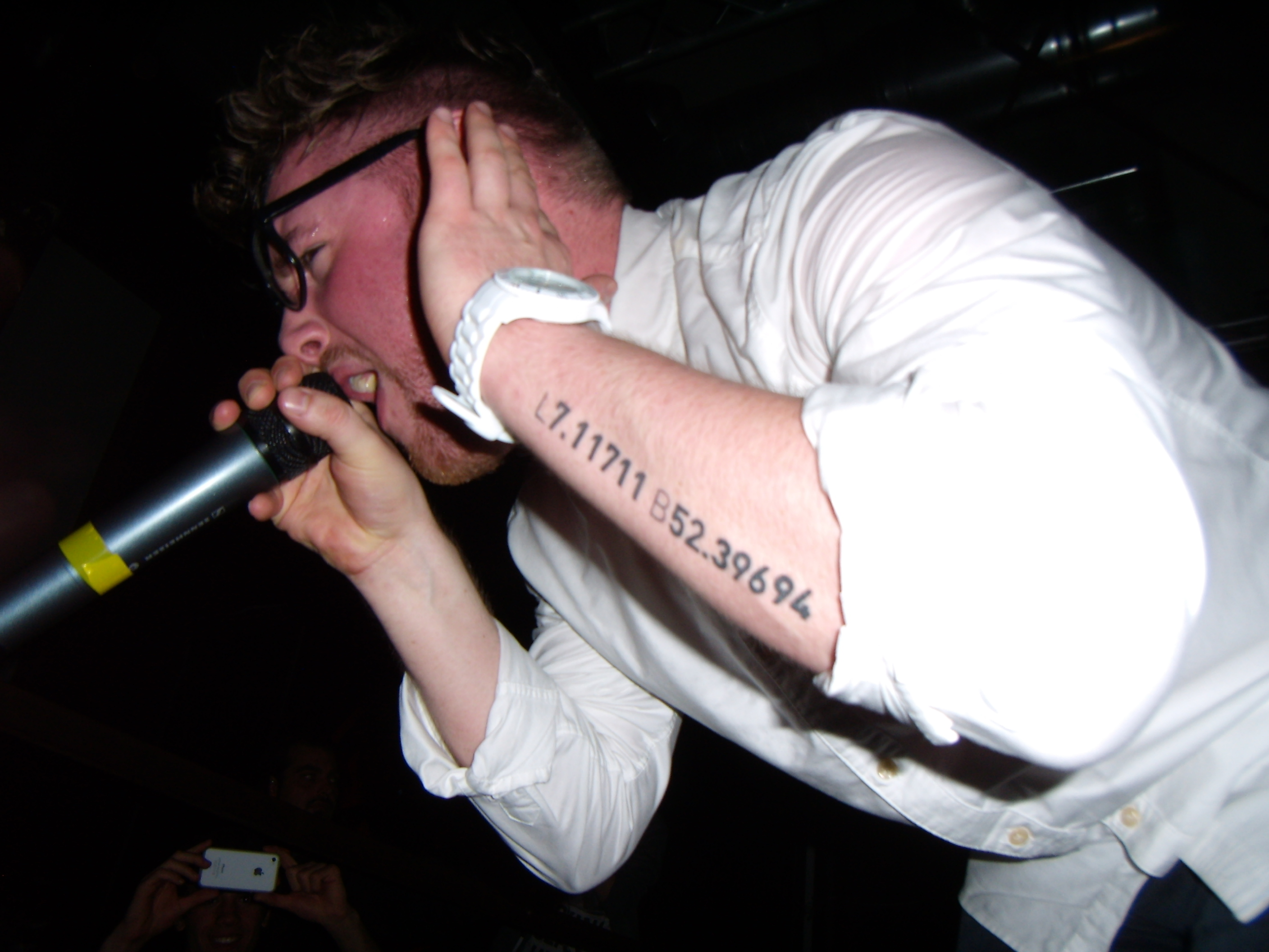 Italobrothers live tour al Tunnel Club (RE)